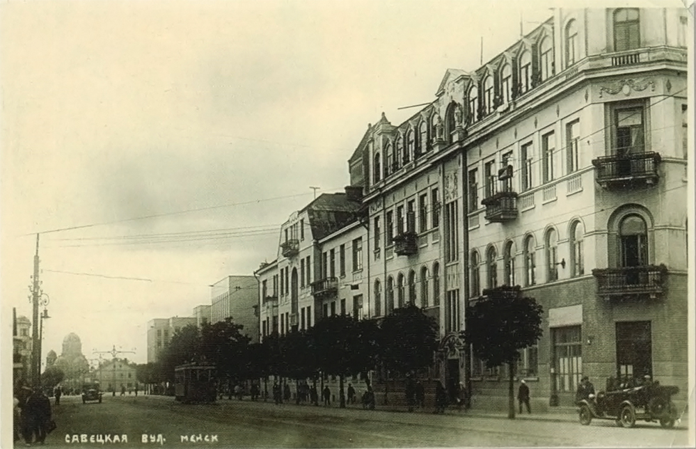 Беларуская (тарашкевіца): Менск (Miensk), вуліца Захараўская (vulica Zacharaŭskaja) ад скрыжаваньня з Ігуменскай (vulica Ihumienskaja). Сучасны пляц Незалежнасьці (plac Niezaležnaści) на старой паштоўцы